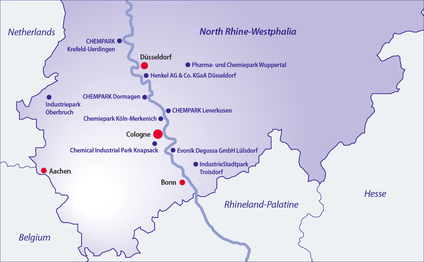 Die ChemCologne-Region mit Ihren wichtigen Ansiedlungsstandorten.